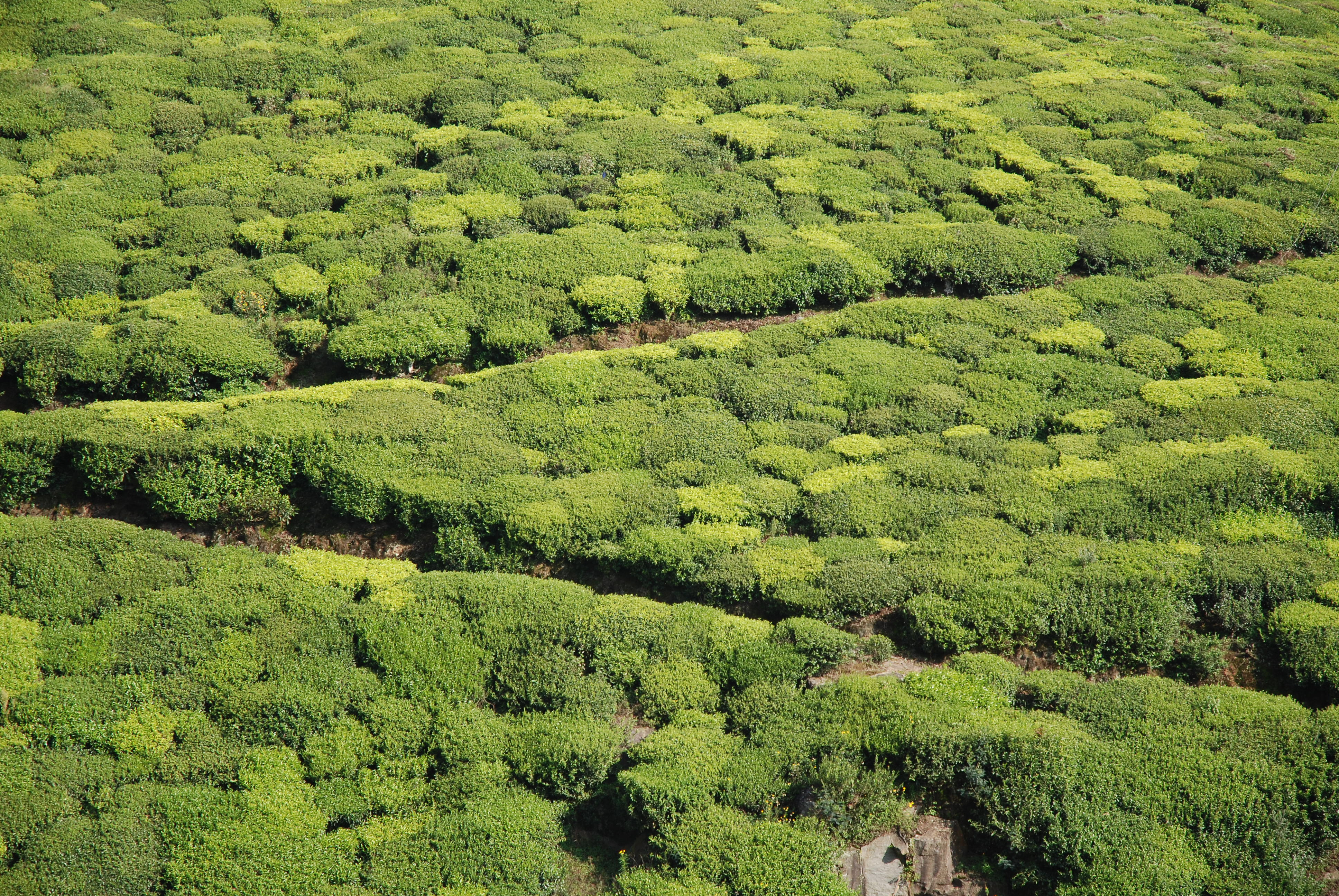 Plantation de thé à Ooty (Udhagamandalam)